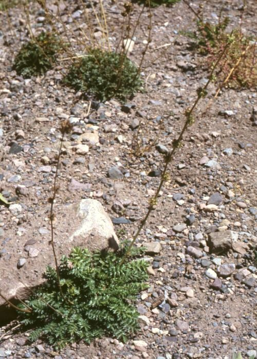 Acaena pinnatifida, Rosengewächse (Rosaceae) - Argentinien/Argentina, Paso de Uspallata, Puente del Inca, ca. 2700 m s.m. (Prov. Mendoza)